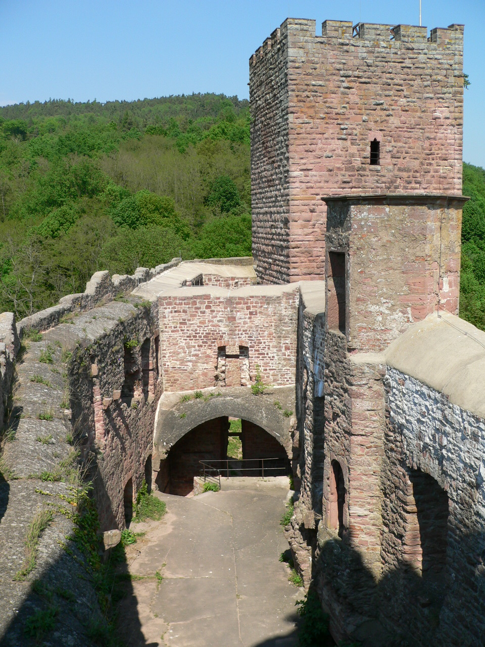 Henneburg oberhalb von Stadtprozelten am Main, Germany - westlicher Palas, Innenansicht; großer Bergfried